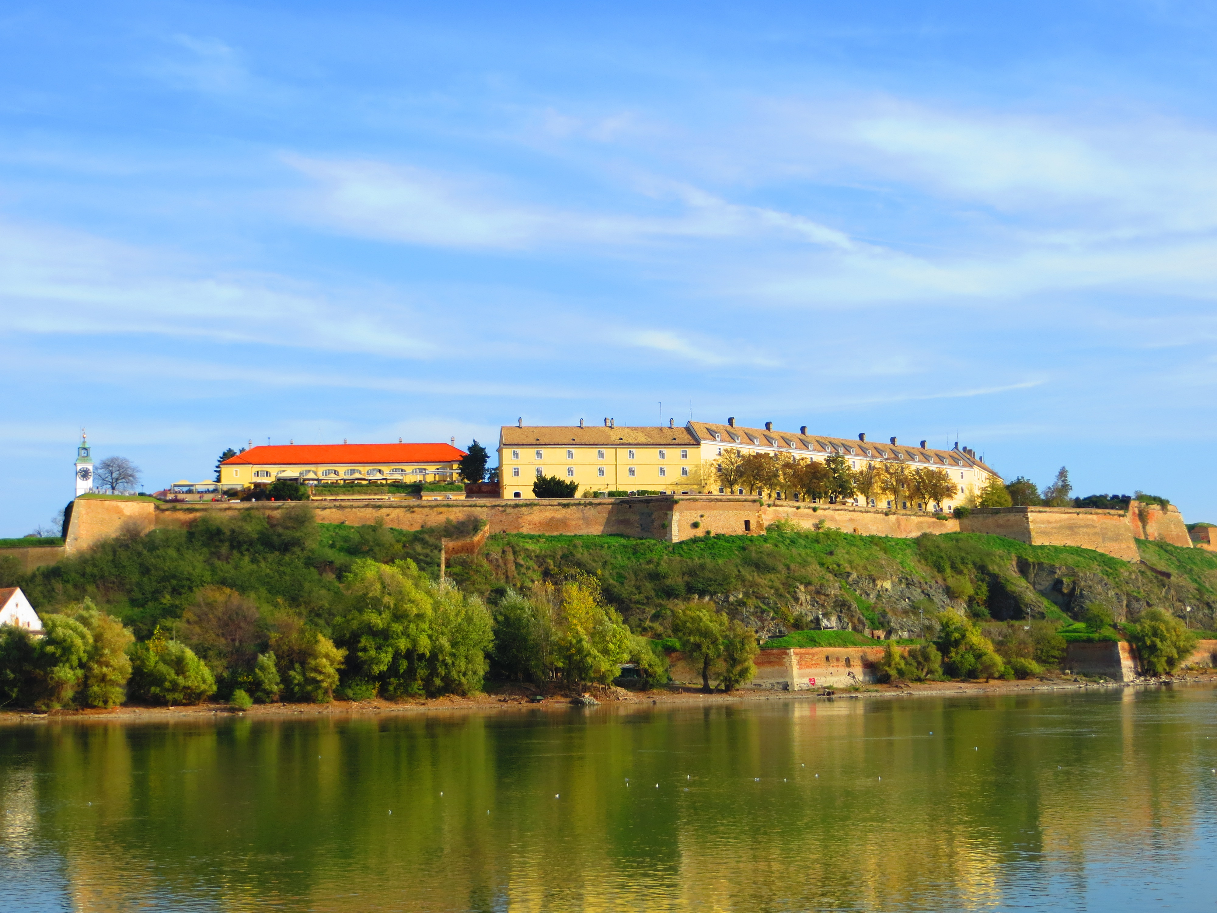 Petrovaradinska tvrđava